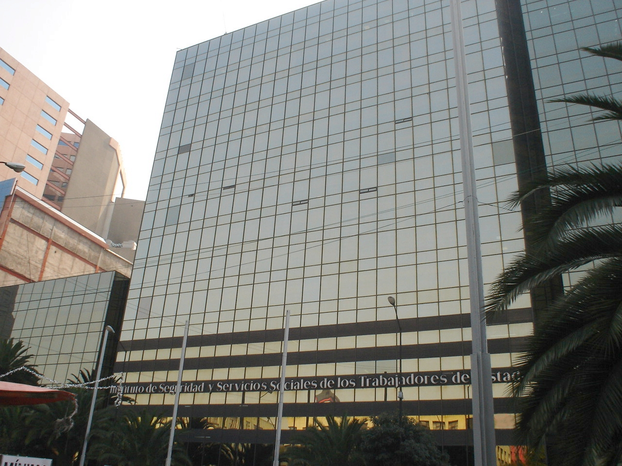 OFICINAS CENTRALES DEL I. S. S. S. T. E.